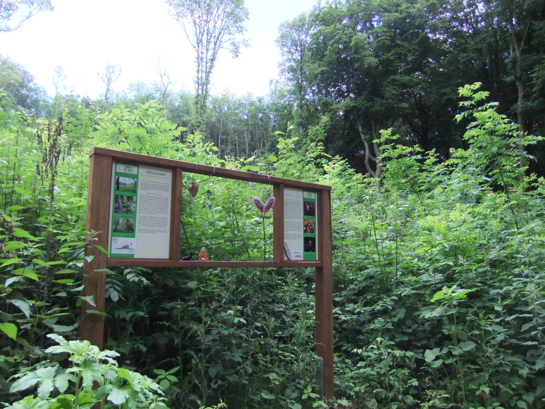 Mittelwaldwirtschaft am Lönkert in Bielefeld.